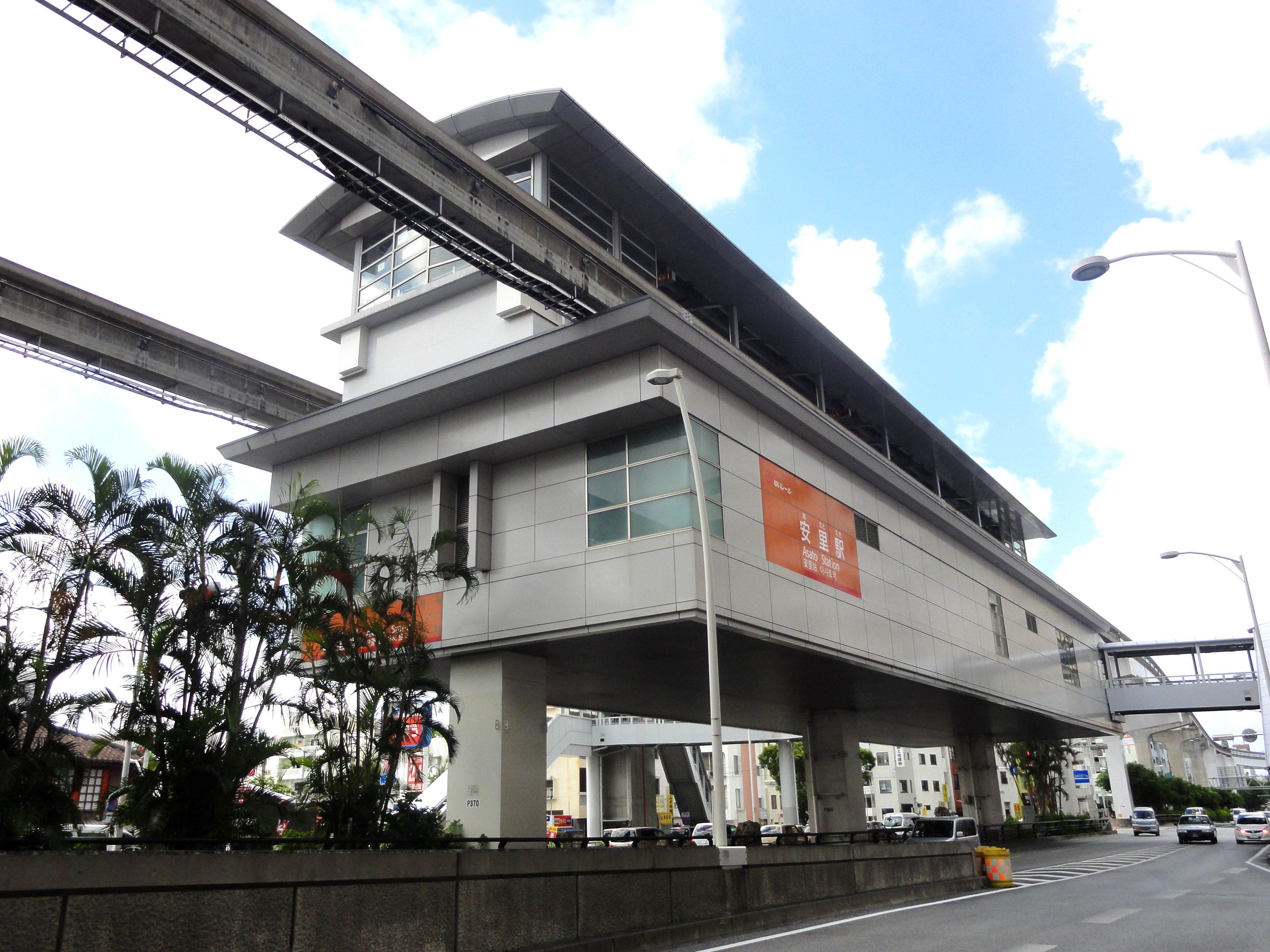 沖縄都市モノレール安里駅